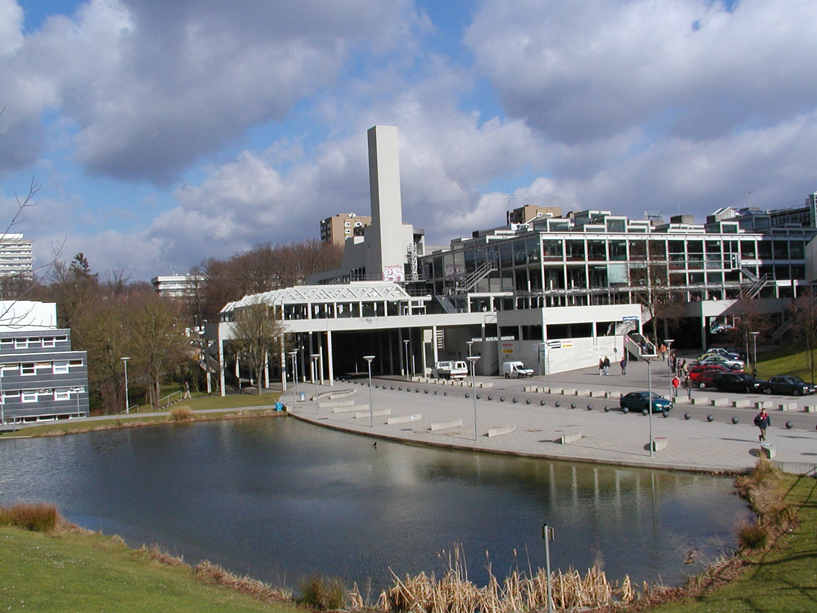 Die Mensa in Stuttgart Vaihingen